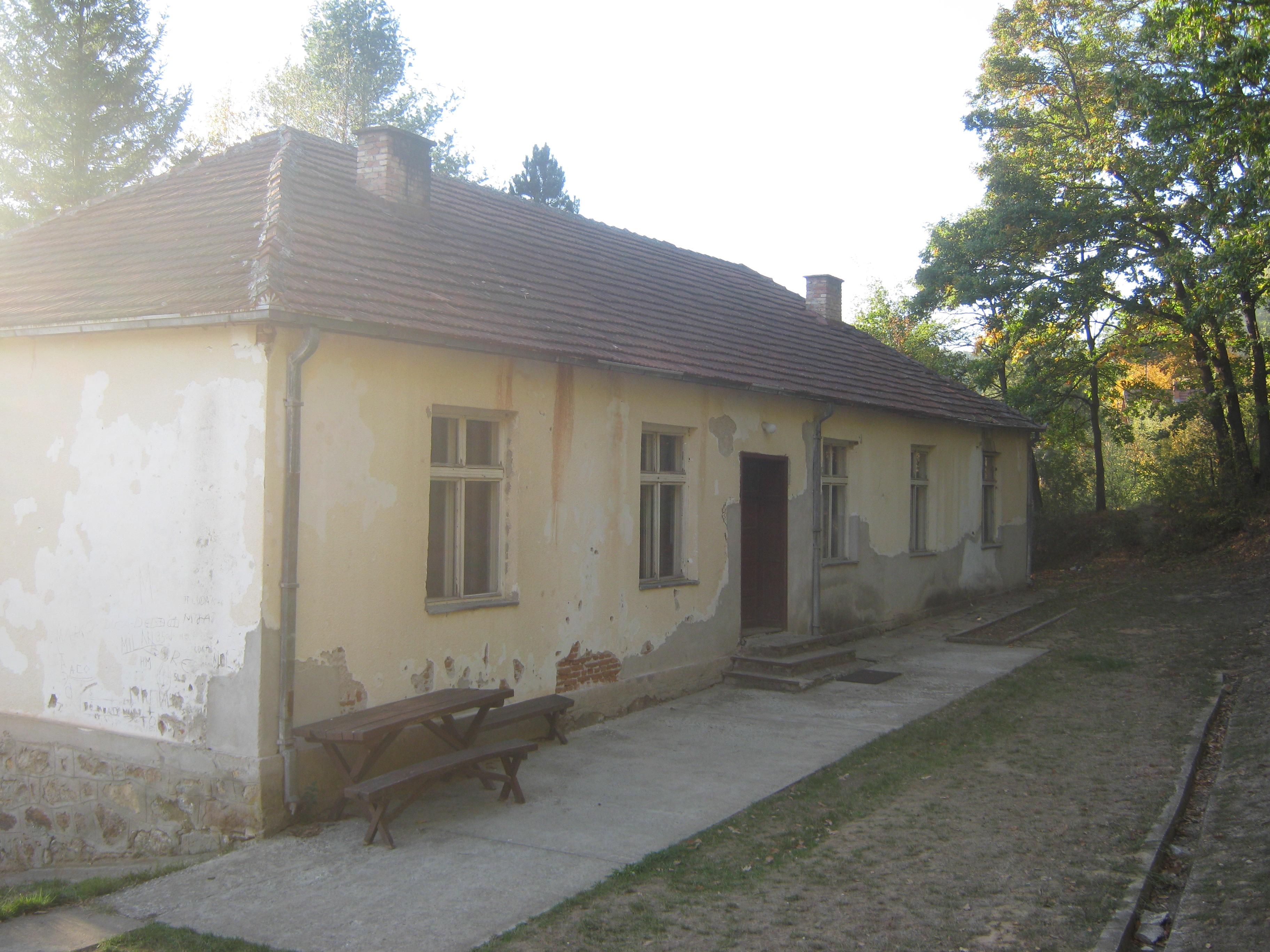 Стара школска зграда на Савинцу, изграђена почетком 20. века. Данас, нажалост, нема довољно ђака, јер се велики број становника одселио у градове. Око отварања ју је похађало и преко 200 ученика.